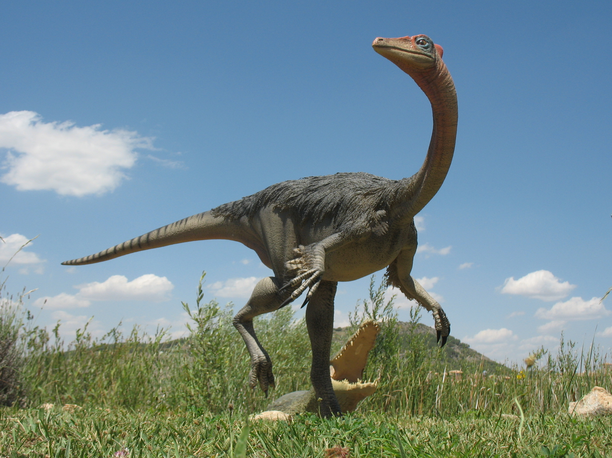 Figura de Pelecanimimus polyodon de Las Hoyas - Museo Paleontológico de Castilla-La Mancha (Cuenca)